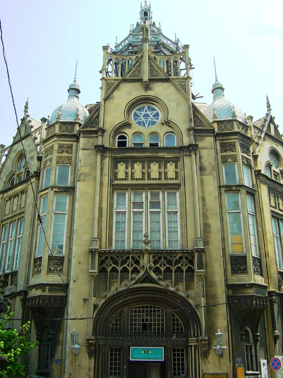 Saadet sarayi building in Baku, Azerbaijan